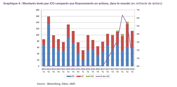 source Bloomberg, Eikon, AMF